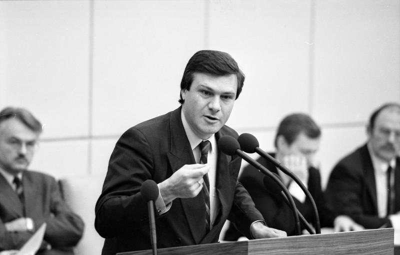 Bonn, 14.12.1990 In der ersten Sitzung des gesamtdeutschen Bundesrates in Bonn traf die Länderkammer die Entscheidung, die Beamtenbesoldung in den neuen Bundesländern für den Bereich der leitenden Beamten zu verbessern. Die neuen Bundesländer sollen ermächtigt werden, die im Einigungsvertrag vorgesehenen 35% eines entsprechenden westdeutschen Gehaltes durch einen nicht ruhegehaltsfähigen Zuschuß von 14% aufzustocken. Die Entscheidung des Bundesrates muß durch die Bundesregierung in Kraft gesetzt werden.